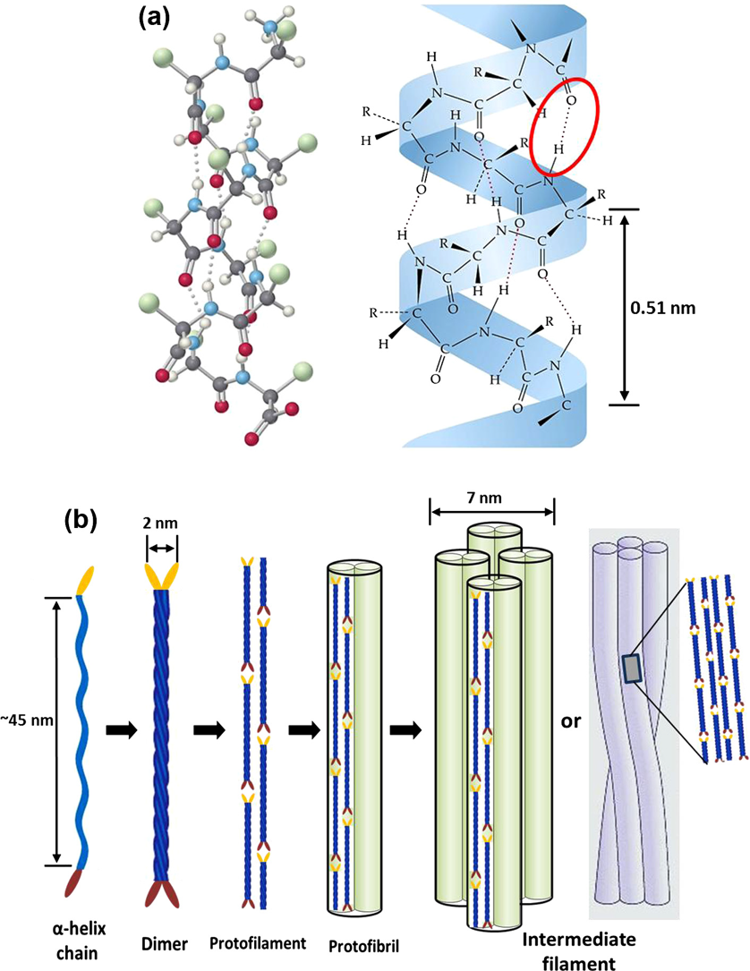 Estrutura do filamento intermediário de alfa-queratina: a)Modelo da cadeia polipeptídica em alfa-hélice mostrando a localização das ligações de hidrogênio. b) Desenho esquemático da formação dos filamentos intermediários.